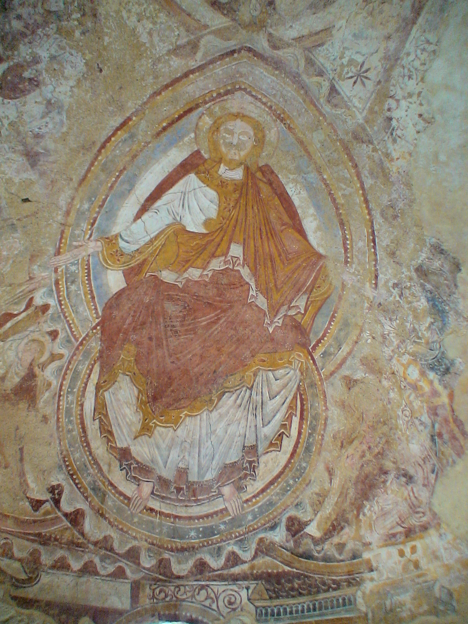 St-Gilles, Montoire-sur-le-Loir (Loir-et-Cher, Frankreich), Fresko